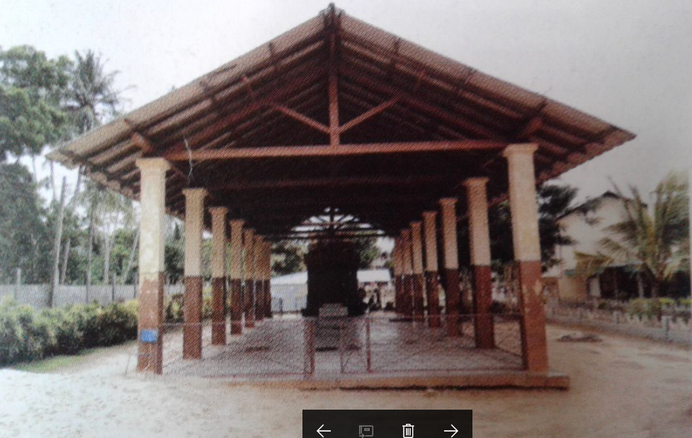 கல்லூரியின் பழைய முருகன் ஆலயத்தின் தோற்றம்